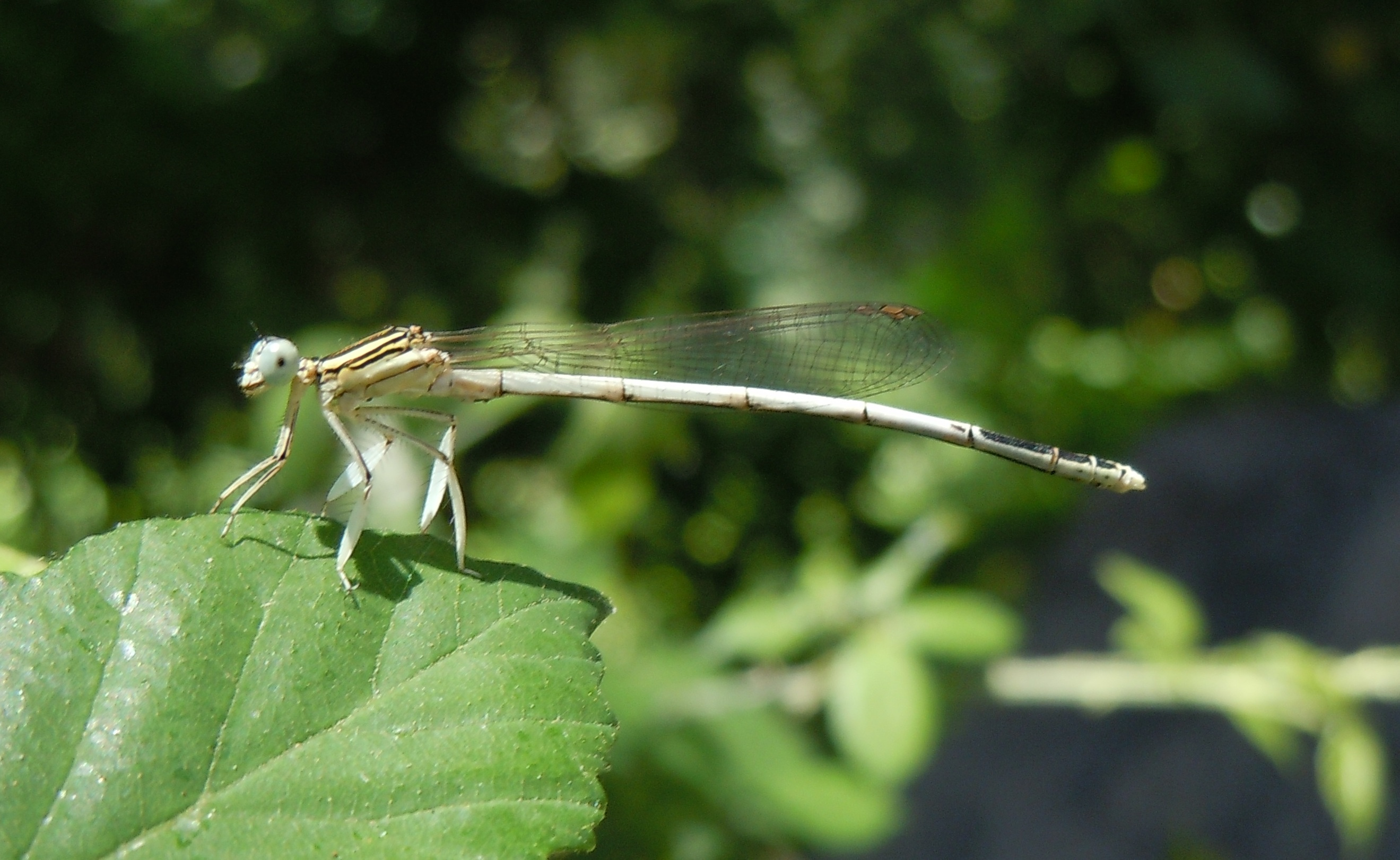 Platycnemis latipes - Agrion blanchâtre mâle - Ardèche France